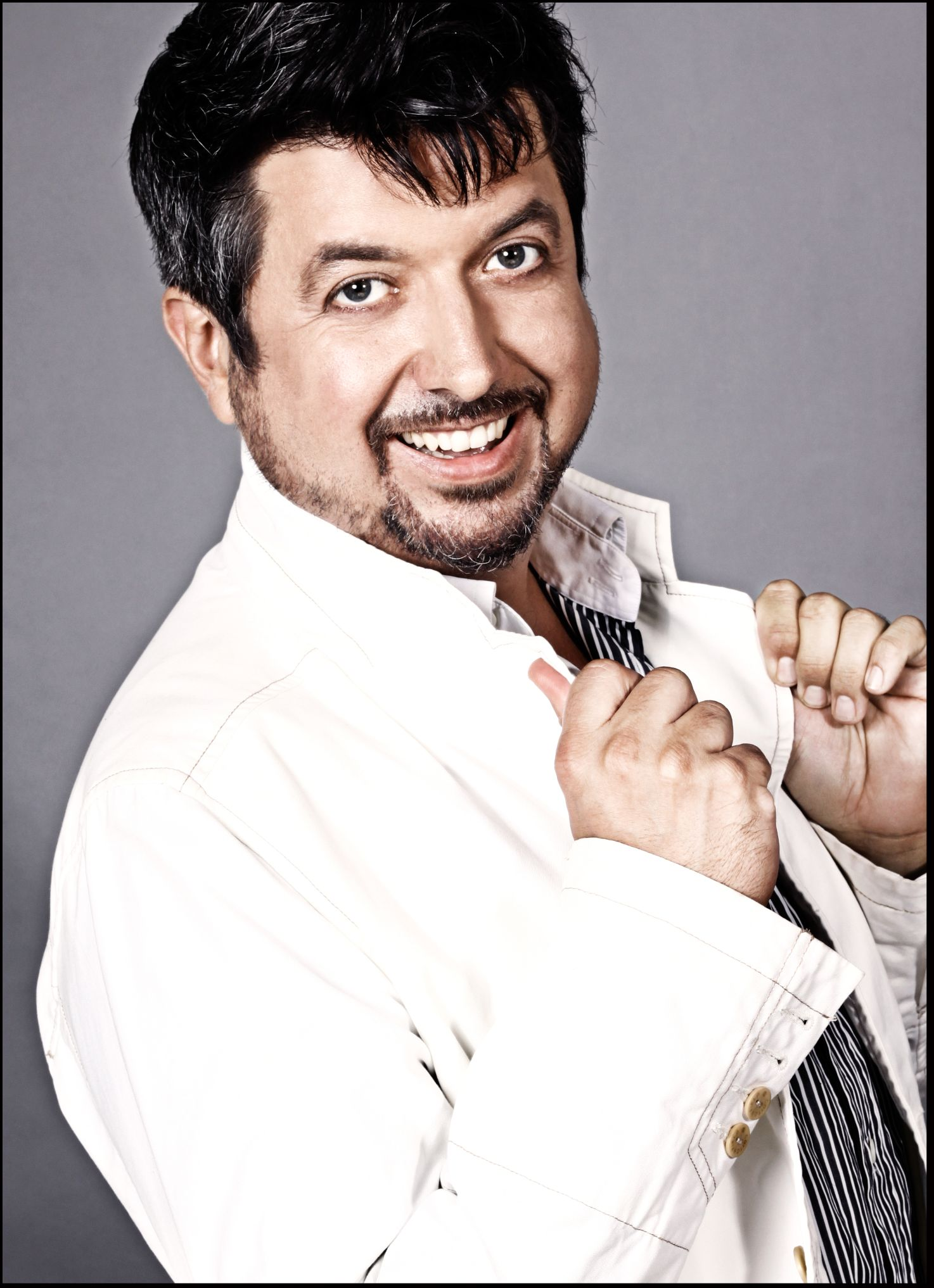 László Boldizsár operaénekes (tenor)